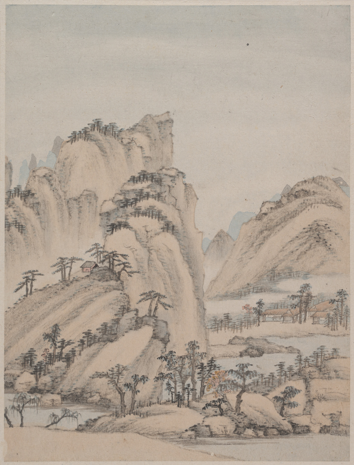 China; Album; Paintings